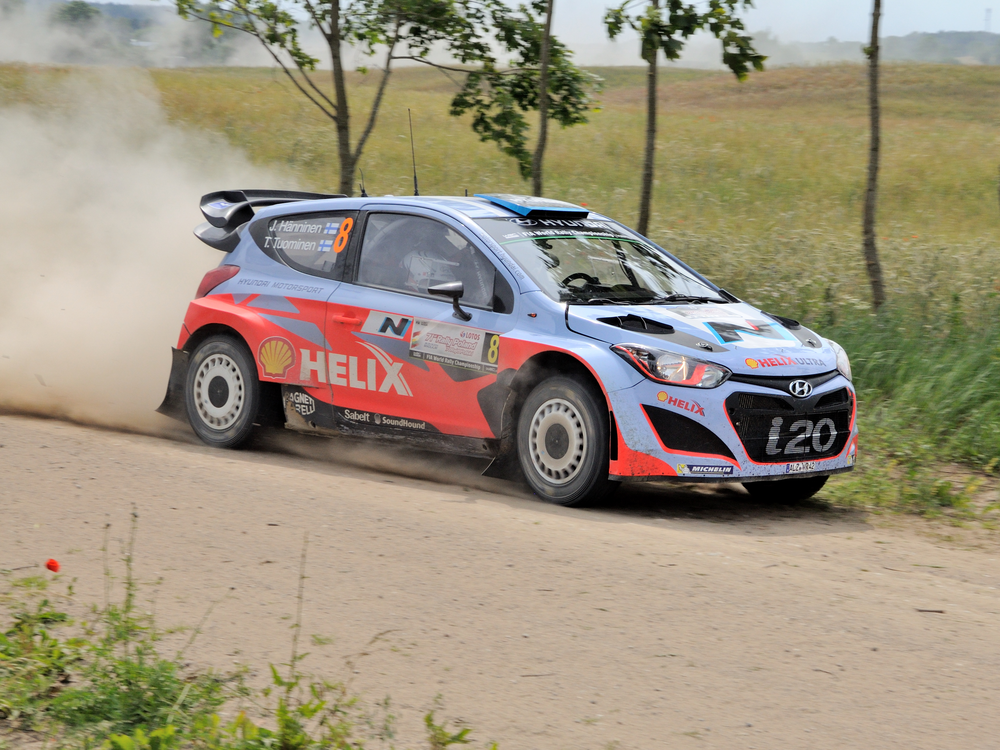 Juho Hänninen podczas Rajdu Polski 2014